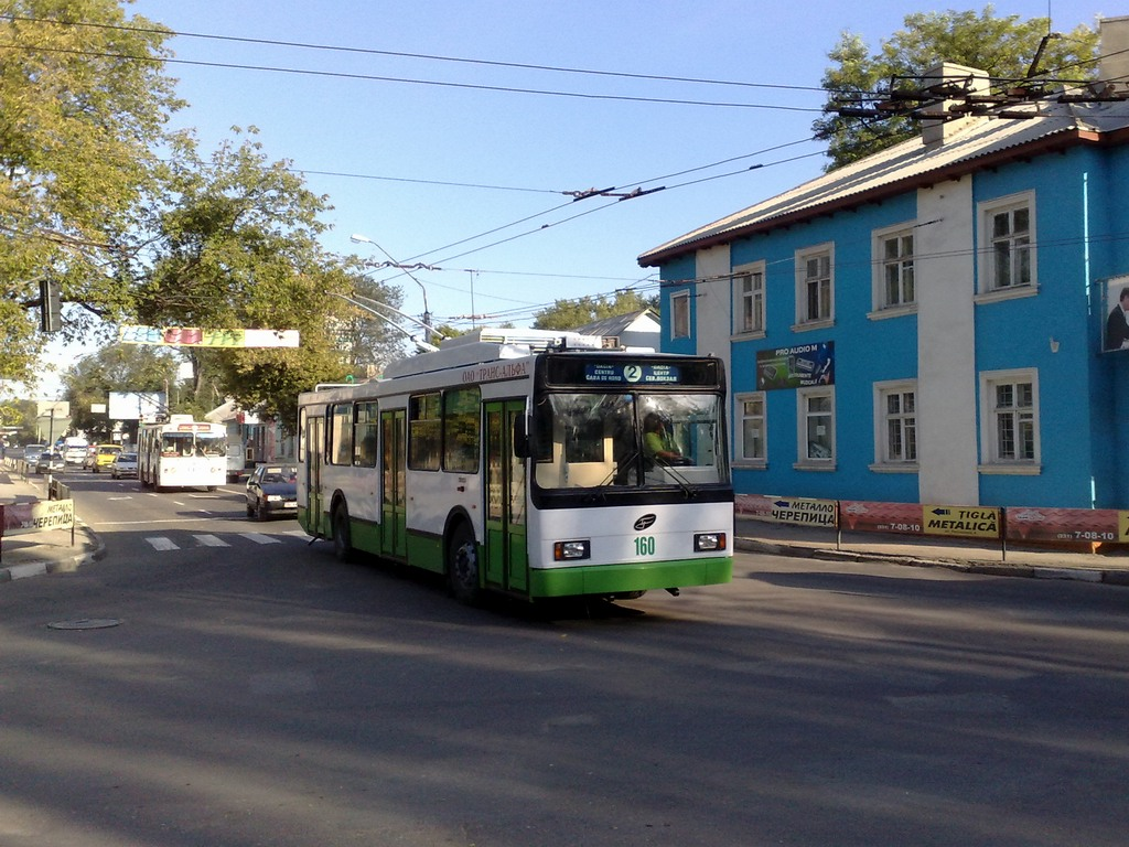 Троллейбус на перекрестке улиц Штефан чел Маре и Дечебал